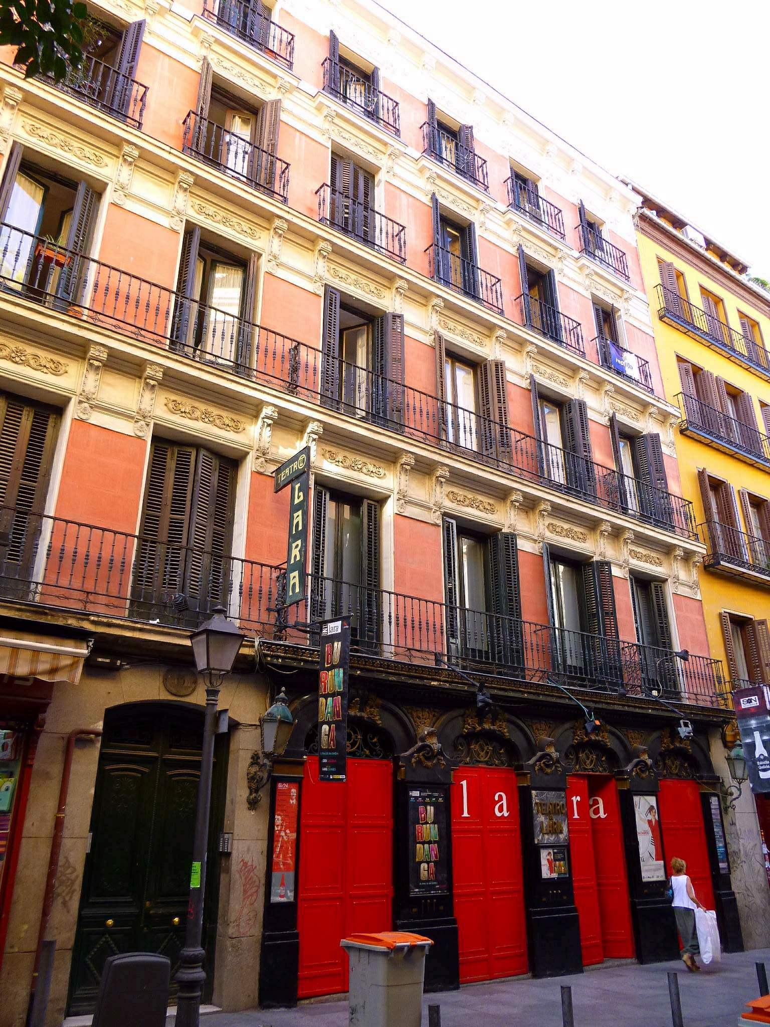 Calle Corredera Baja de San Pablo, barrio de Malasaña, Distrito Centro, Madrid